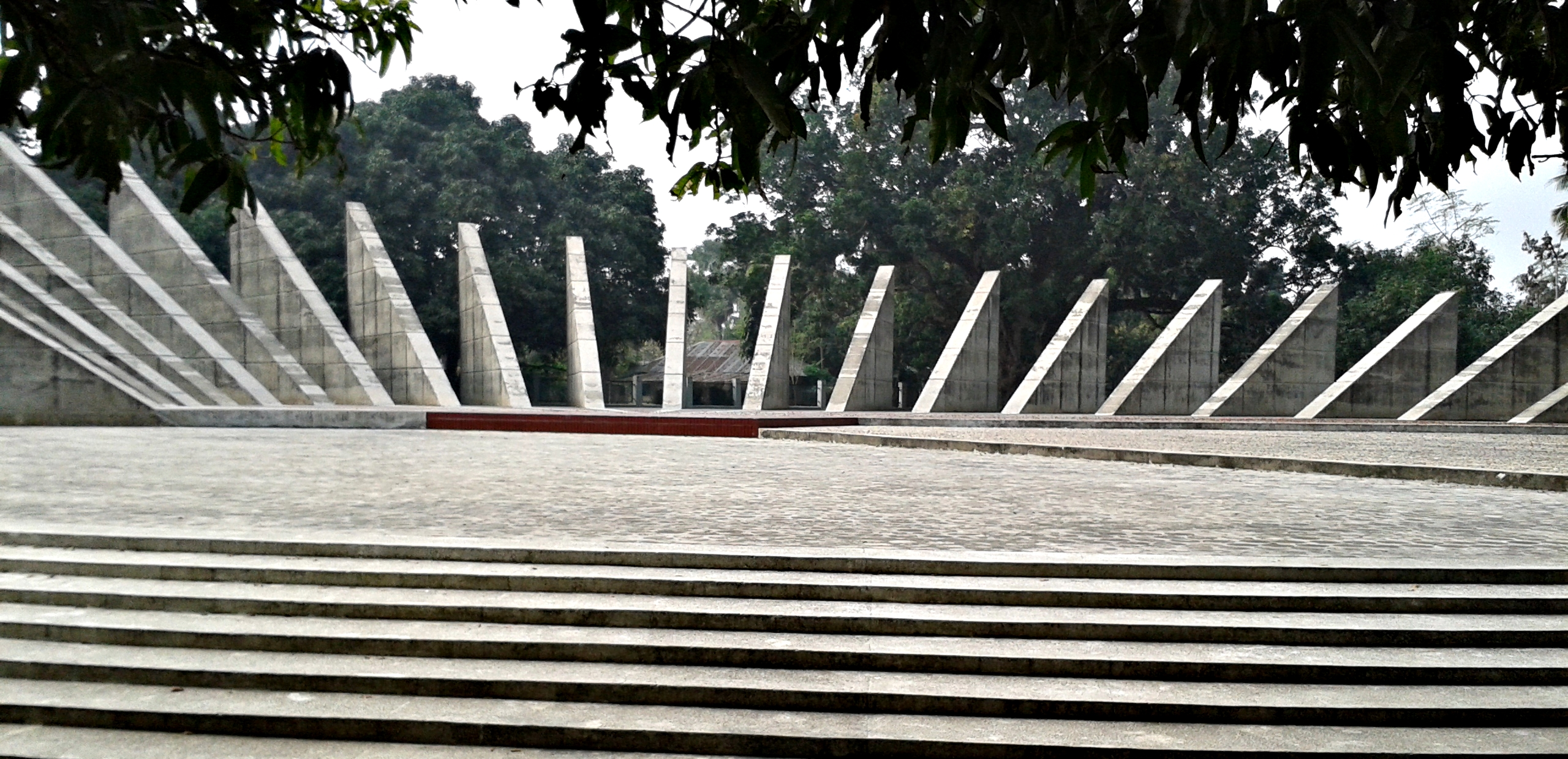 মুজিবনগর স্মৃতিসৌধ